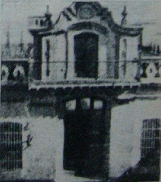 Casa donde nació y murió el patriota Manuel Belgrano (1770-1820), miembro de la Primera Junta de gobierno de 1810, general del Ejército del Norte. Se encontraba en la actual Avenida Belgrano, entre las calles Defensa y Bolívar, de la vereda sur. Fue demolida con el ensanche de la calle en la década de 1930. Hoy está allí el Edificio Calmer.